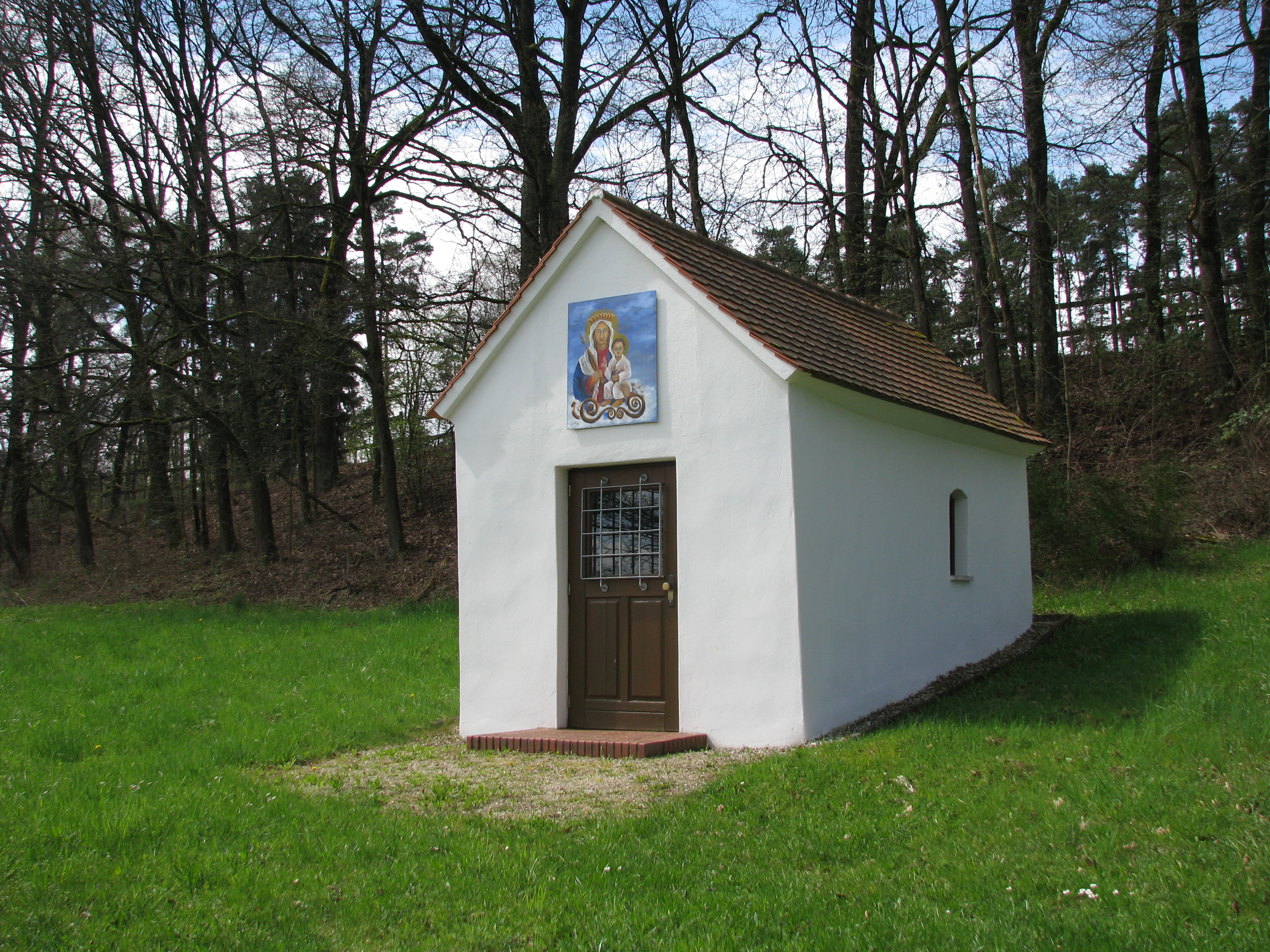 Möningerberg bei Möning, Ortsteil von Freystadt im Landkreis Neumarkt in der Oberpfalz, 14-Nothelfer-Wallfahrtskapelle von 1794